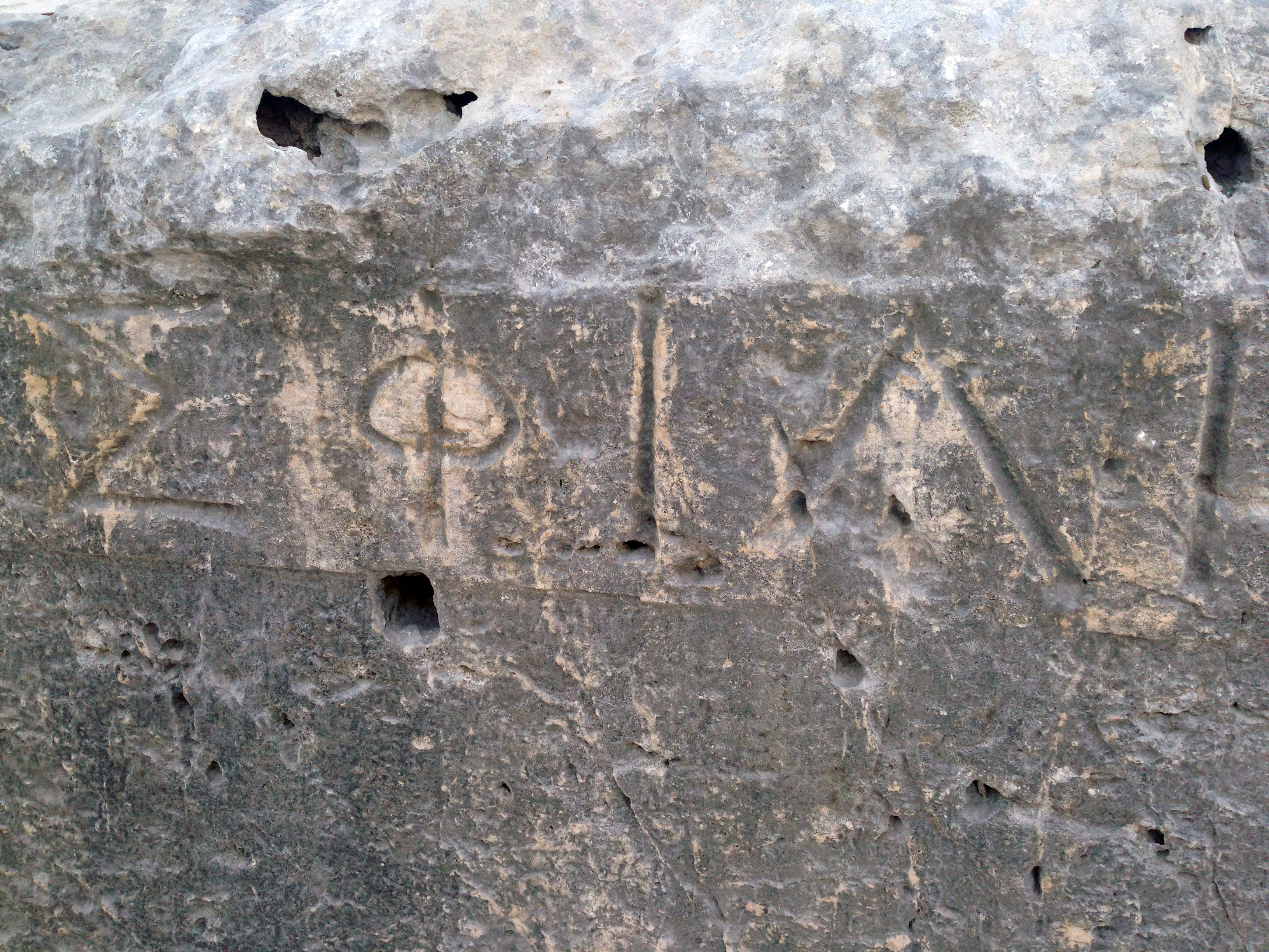 Ancient Greek incriptions at theatre (Syracuse)